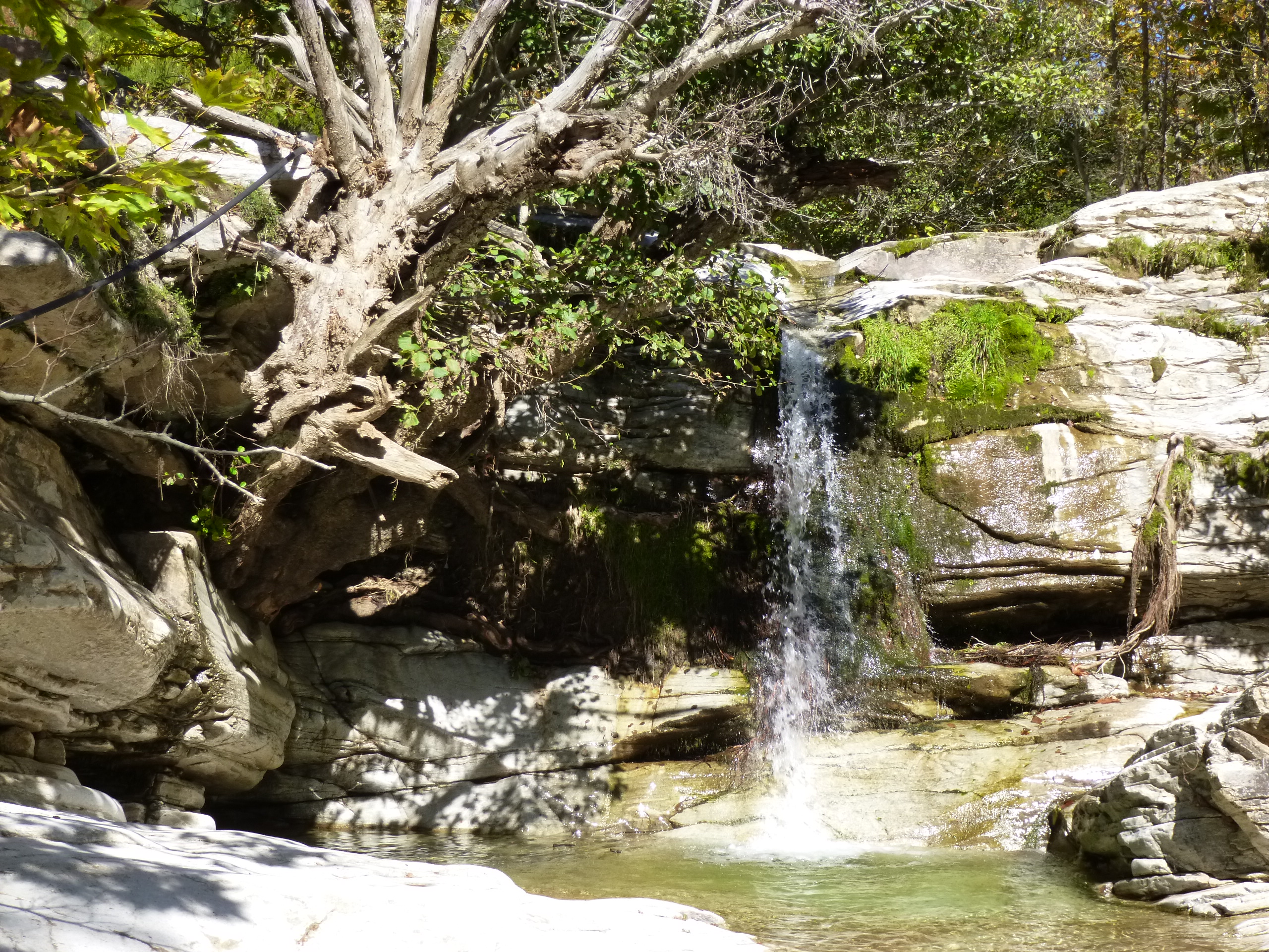 Wasserfall in einem Bachlauf nahe der griechischen Ortschaft Maries; Insel Thassos.